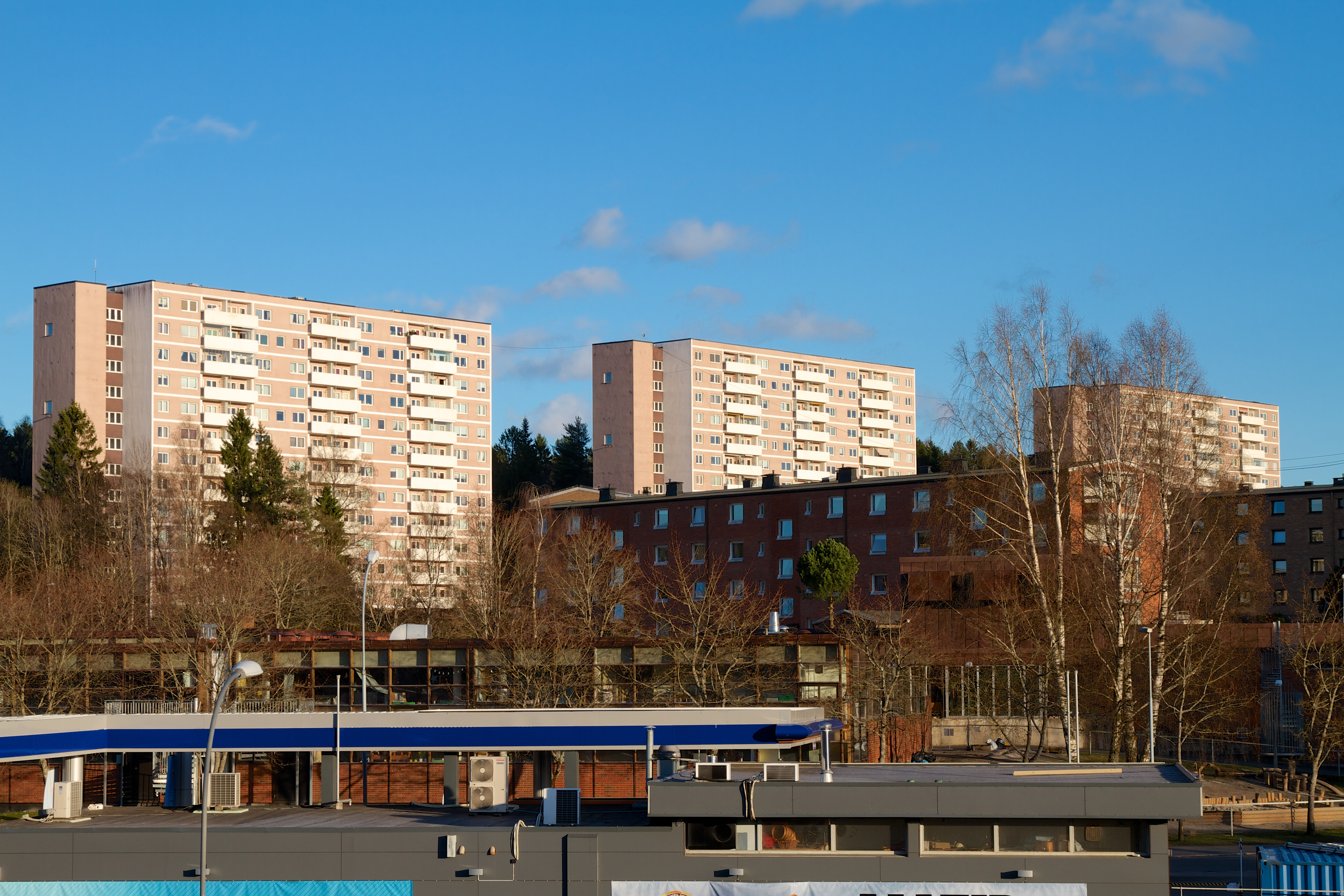 Bølerlia på Bøler i Oslo.